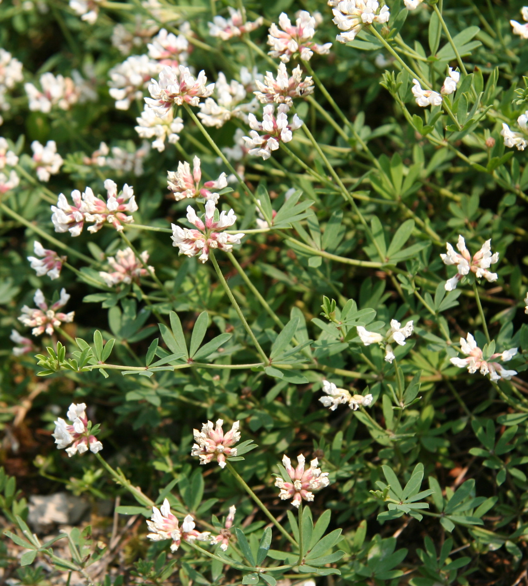 Dorycnium germanicum im Botanischen Garten Dresden